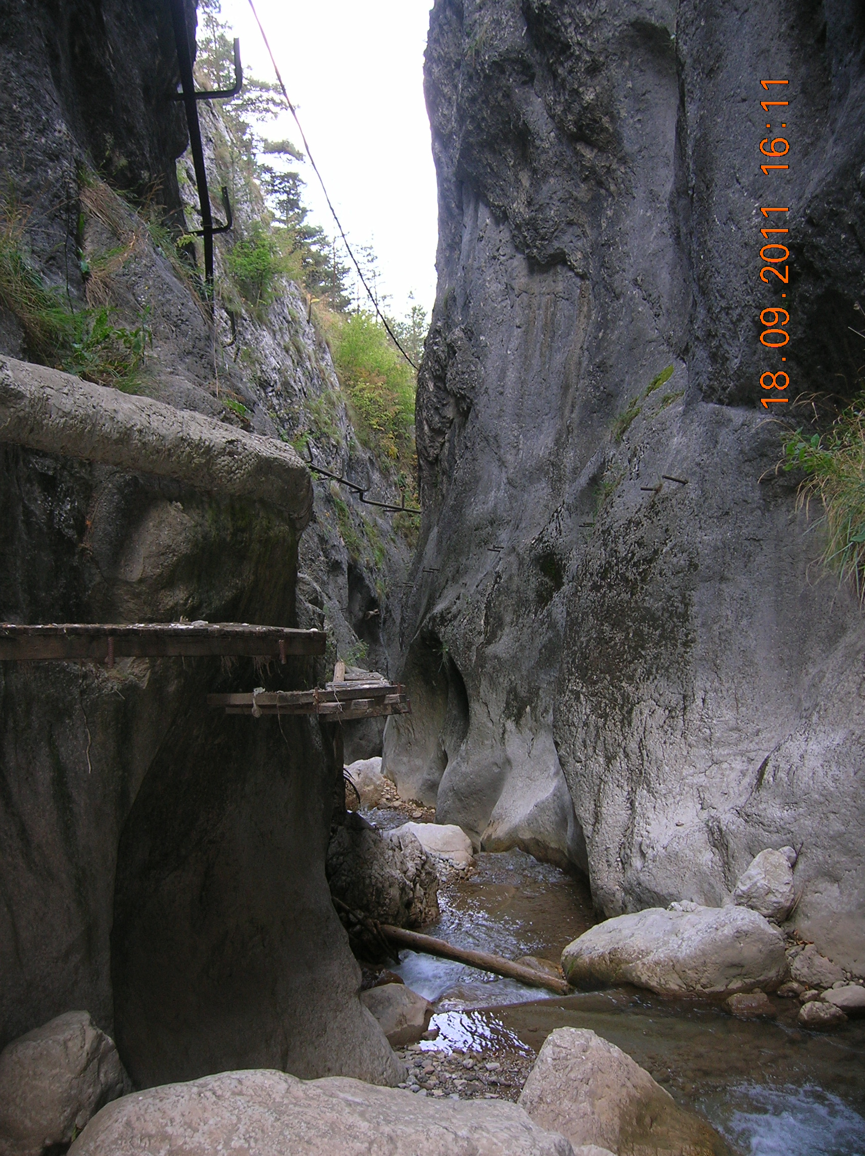 Cheile Şugăului, Rezervaţia Cheile Şugăului-Munticelu, Parcul Naţional Cheile Bicazului-Hăşmaş, Judeţul Neamţ, România